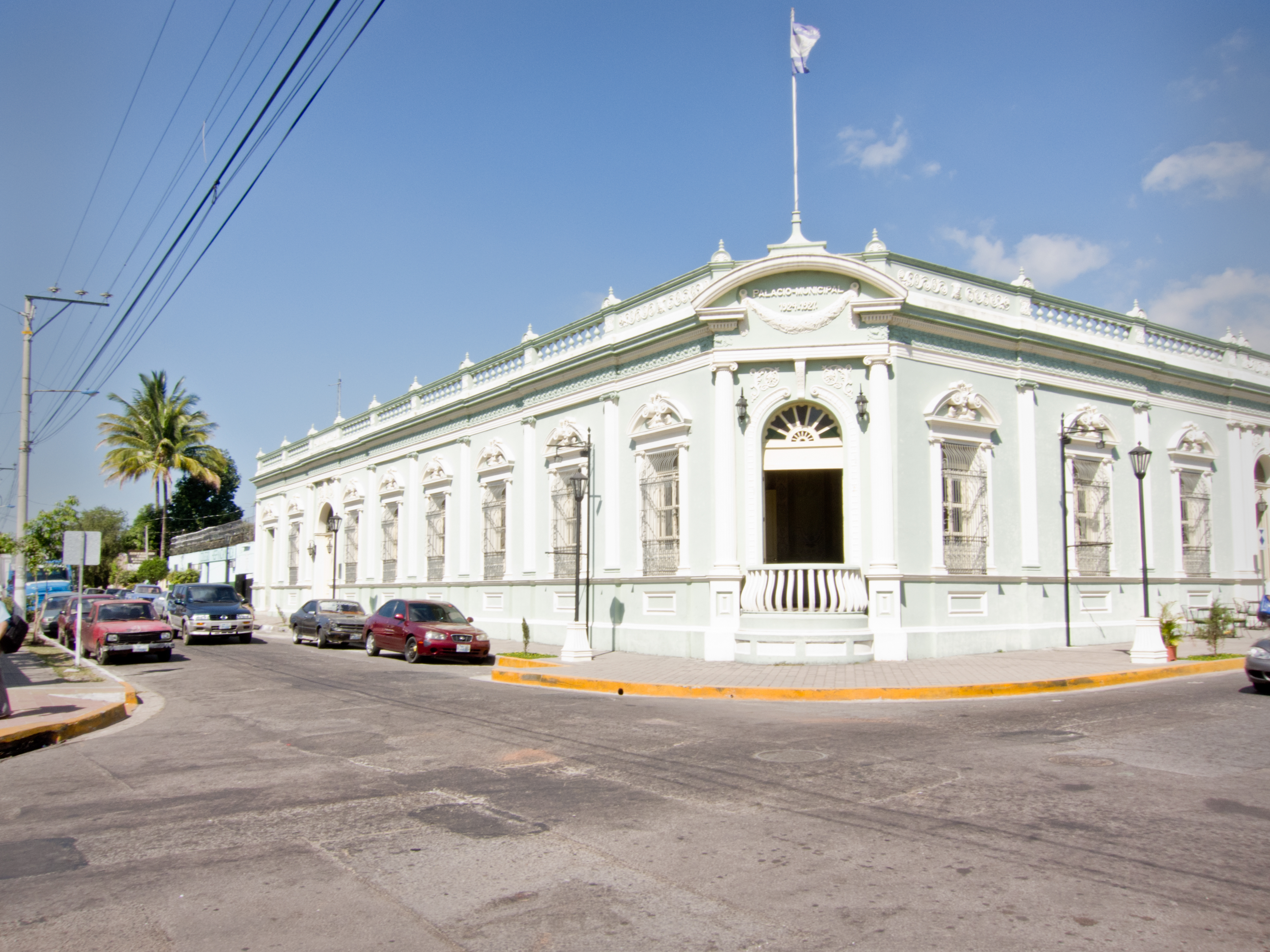 Palacio municipal de bellas artes de la cuidad de Sta Tecla, La Libertad, El Salvador